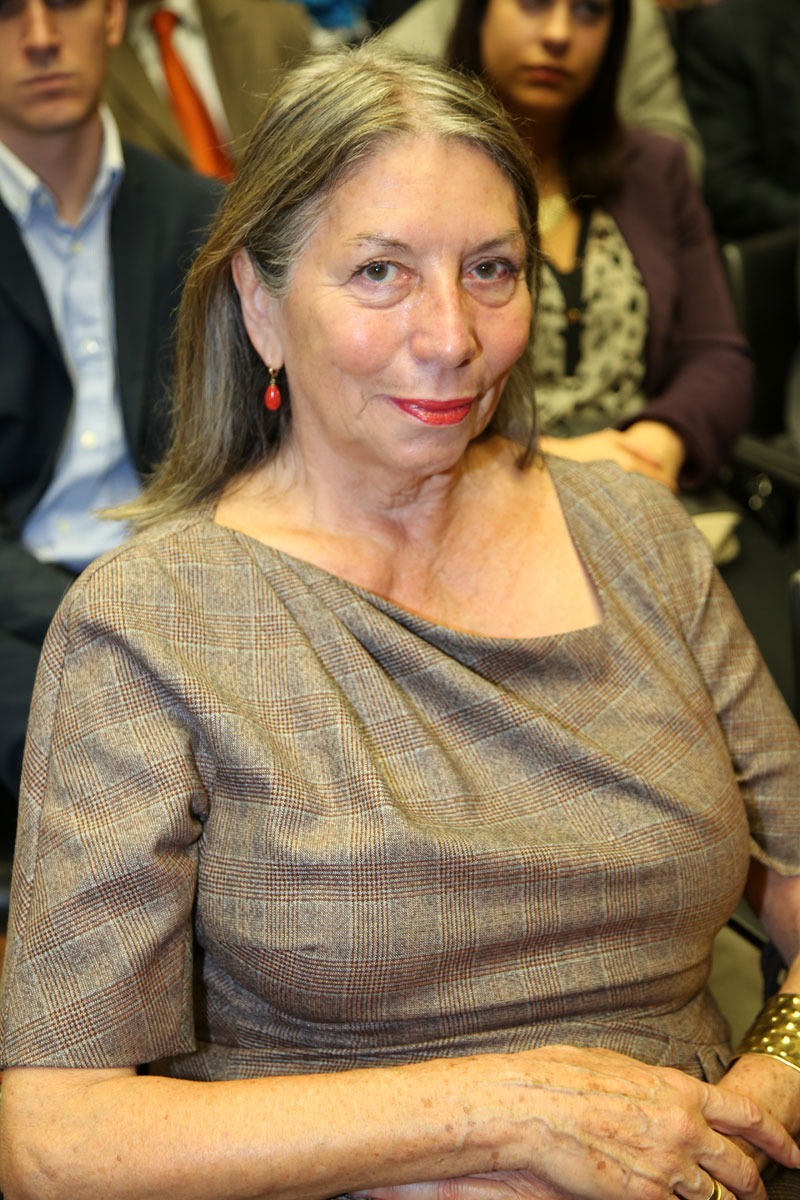 Heidemarie Unterreiner-4003